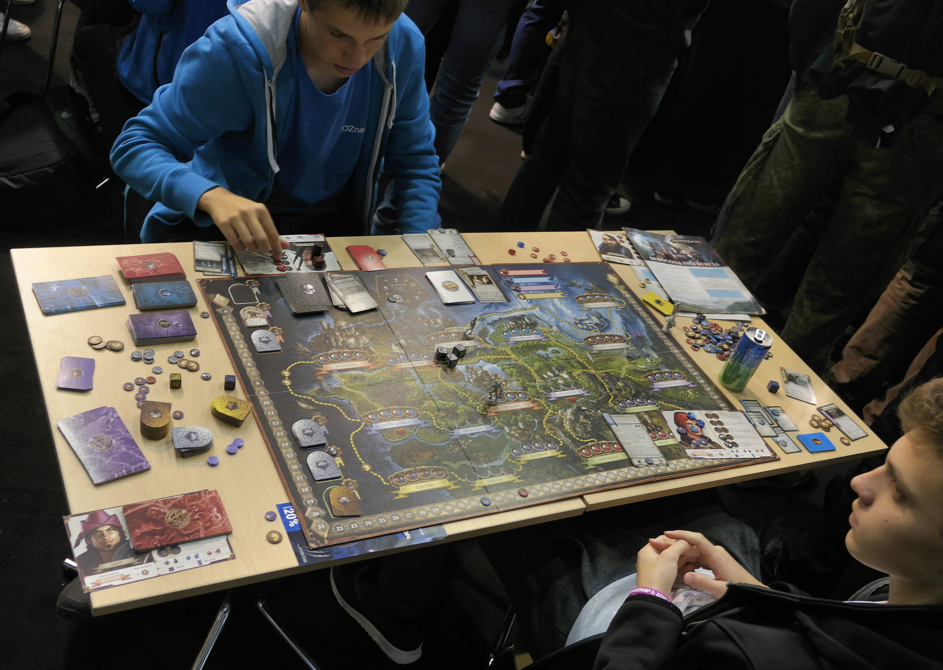 Ekspozycja na targach Poznań Game Arena 2015